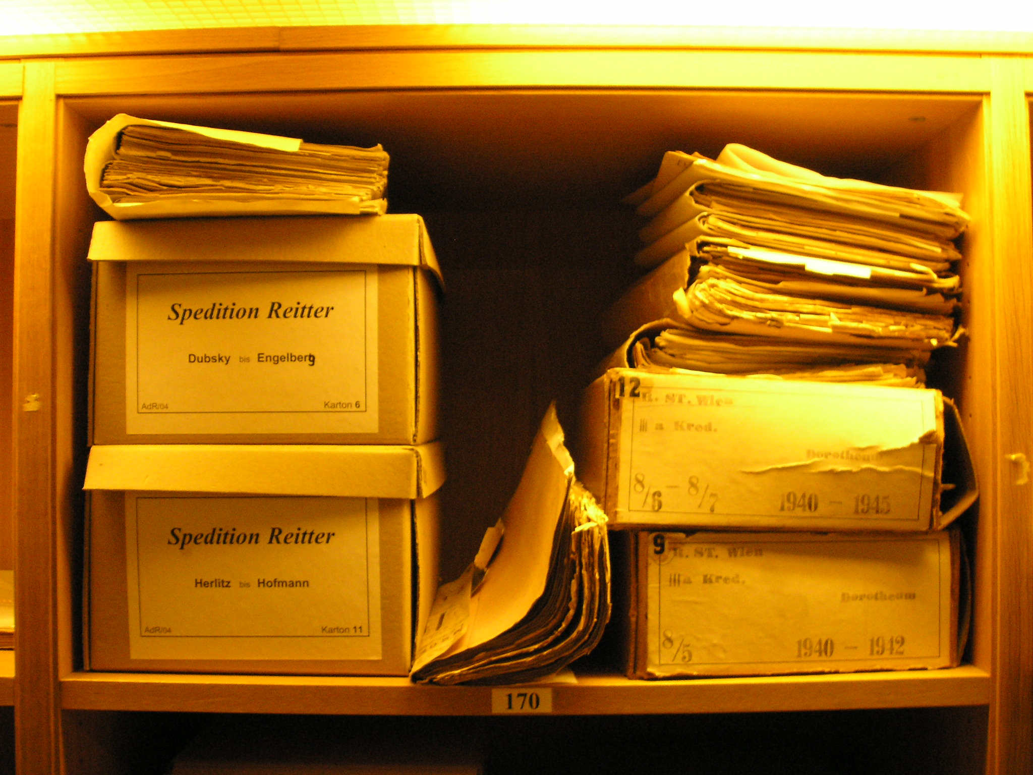 Österreichisches Staatsarchiv in Erdberg